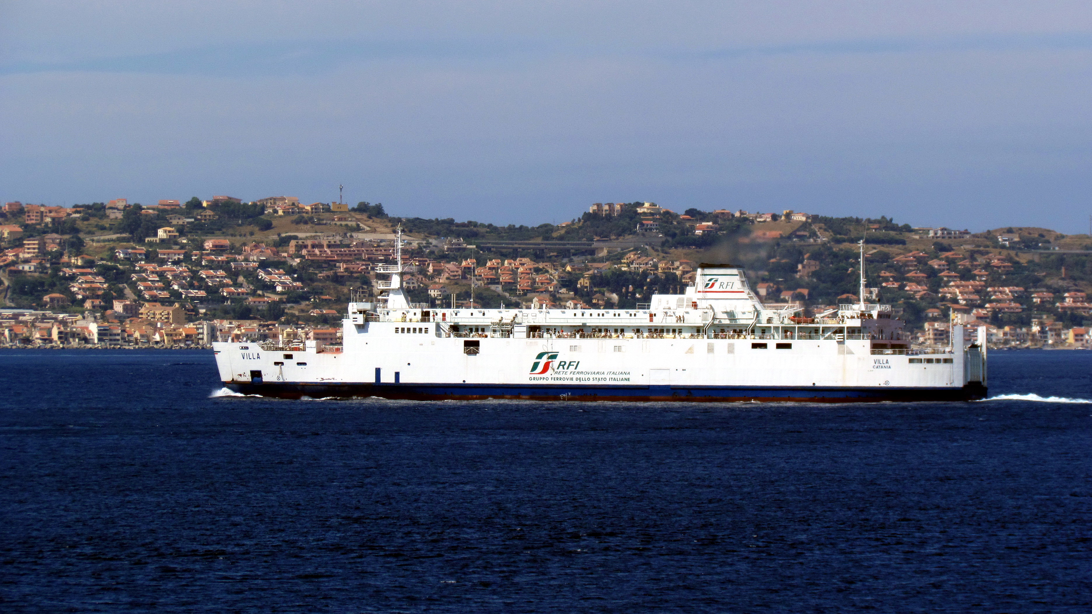 Traghetto RFI Villa in navigazione nello stretto di messina